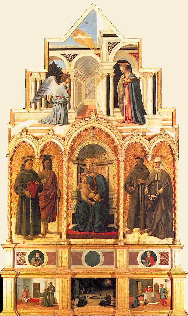 Retable San'Antonio di Perugia by Piero della Francesca